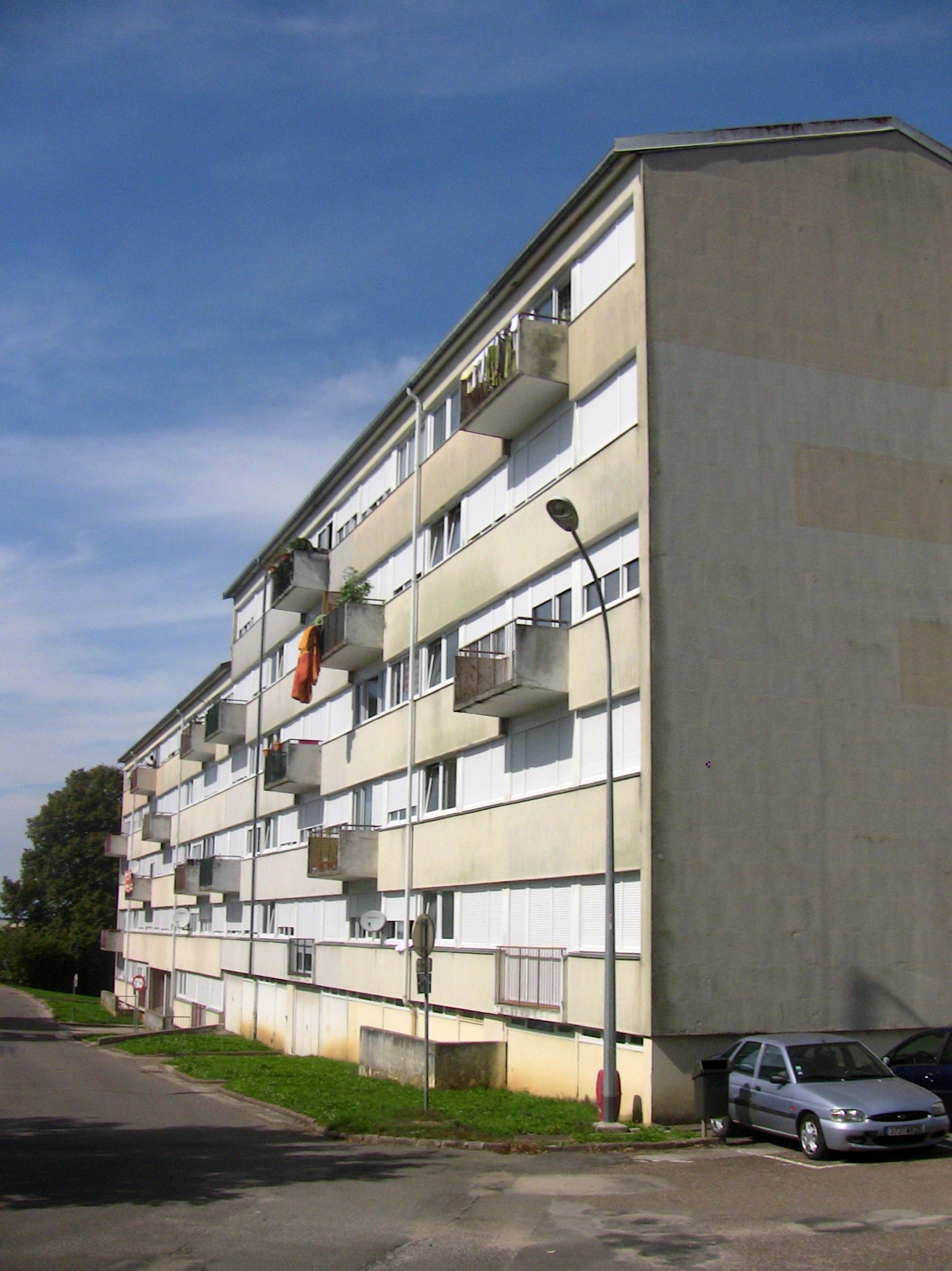 Un bâtiment HLM de la rue Boissy d'Anglas de Bregille, à Besançon (Doubs, France).